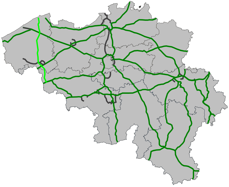 Traject Europese weg 403 in België